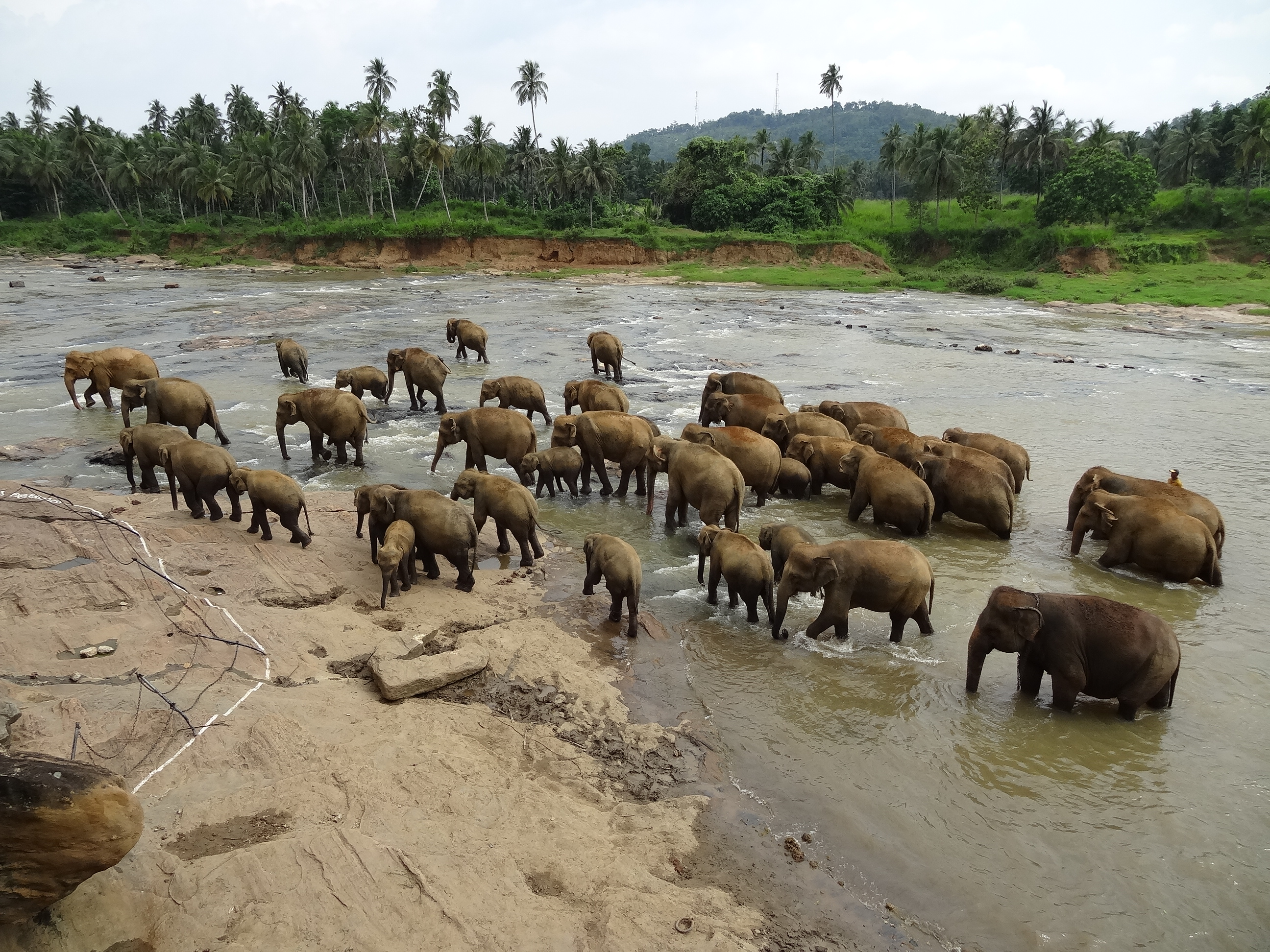 Pinnawala Elephant Orphanage